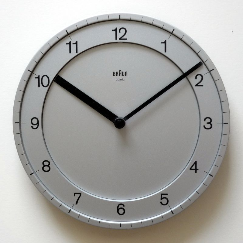 Braun Wanduhr ABW 31 (silberfarbene Millennium-Edition)